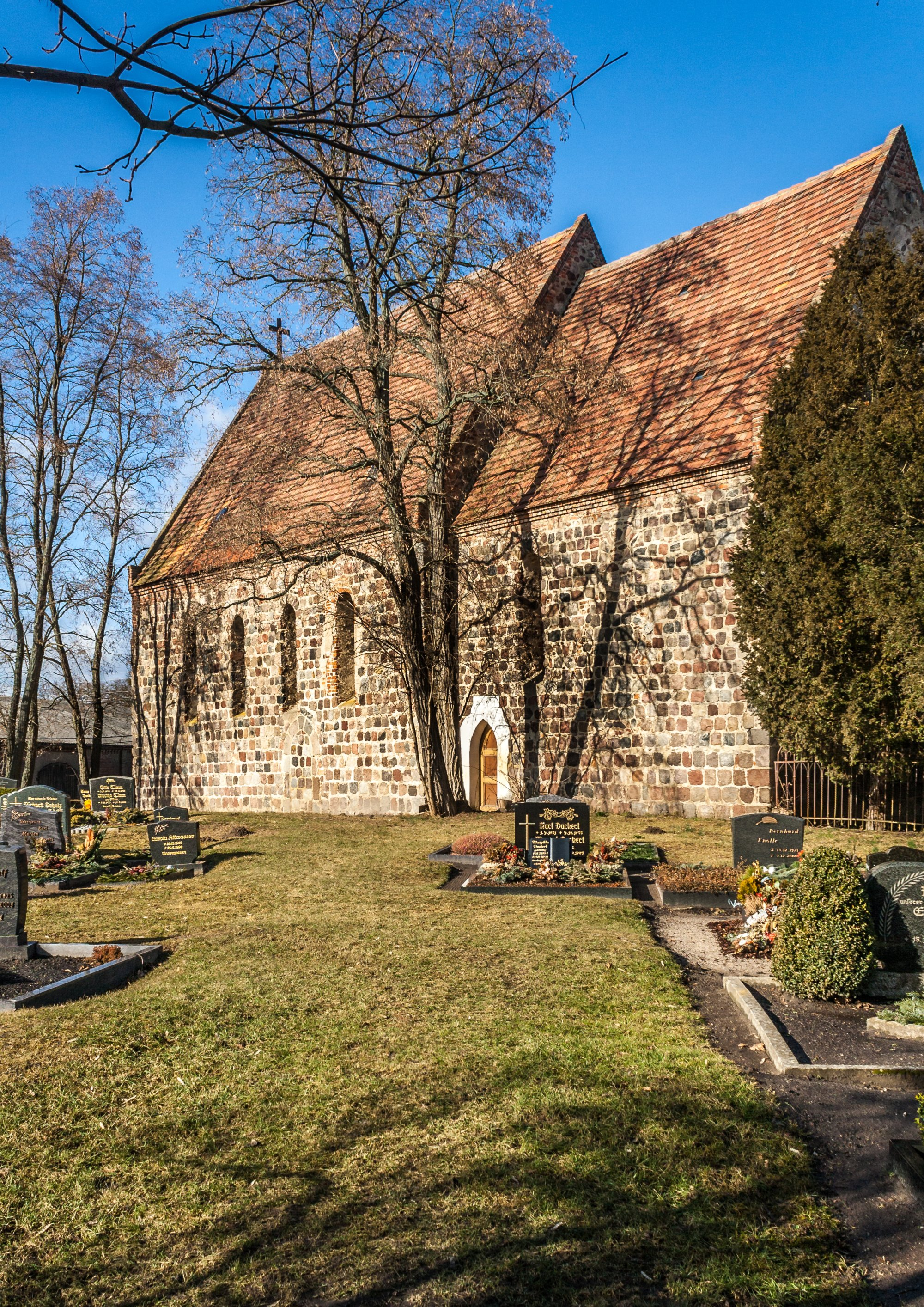 Die Dorfkirche Hohenlandin ist ein frühgotischer Feldsteinbau mit eingezogenem Rechteckchor aus dem 13. Jahrhundert. Beide sind durch einen spitzen Triumphbogen verbunden. Die alten Spitzbogenportale im Norden und Süden sind verändert, das westliche wurde verkleinert. Die Fenster im Schiff und im Ostgiebel sind schmal und spitzbogig. Der Ostgiebel wird gegliedert durch drei Spitzbogenblenden mit einer darüberliegenden Rundblende. Ein verschlossener Eingang am Ostende der Nordseite deutet auf einen ehemaligen Gruftanbau an dieser Stelle. Nach einem Brand durch Blitzeinschlag 1945 wurde die Kirche zur Ruine. Bis 1957 wurde die Kirche dann wieder ausgebaut und mit einer neuen einfachen Einrichtung versehen. Die flachen Decken wurden mit Holz getäfelt. In der Kirche befindet sich im Westgiebel eine Glocke von 1480 mit einem Durchmesser von 94 cm. Sie enthält eine Inschrift, und darunter befindet sich ein hängender Blattfries.